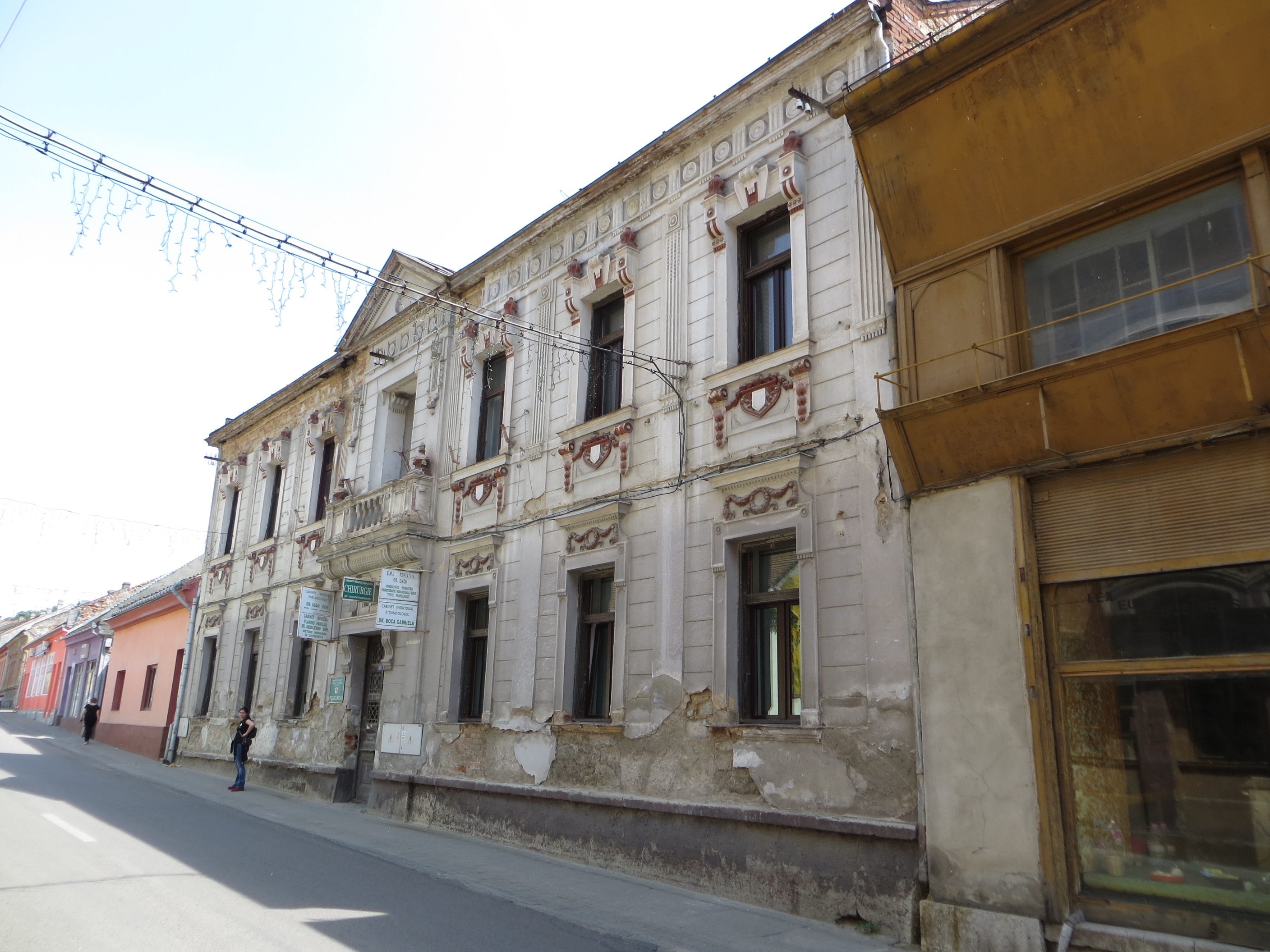 Clădire, azi policlinică